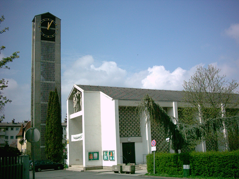 Kath. Pfarrkirche Hl. Familie